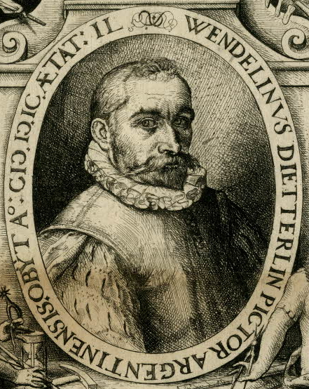 Portrait des Wendel Dietterlin im Alter von 49 Jahren zum Zeitpunkt seines Todes, angefertigt nach einem Selbstportrait (Ausschnitt, das gesamte Blatt siehe )